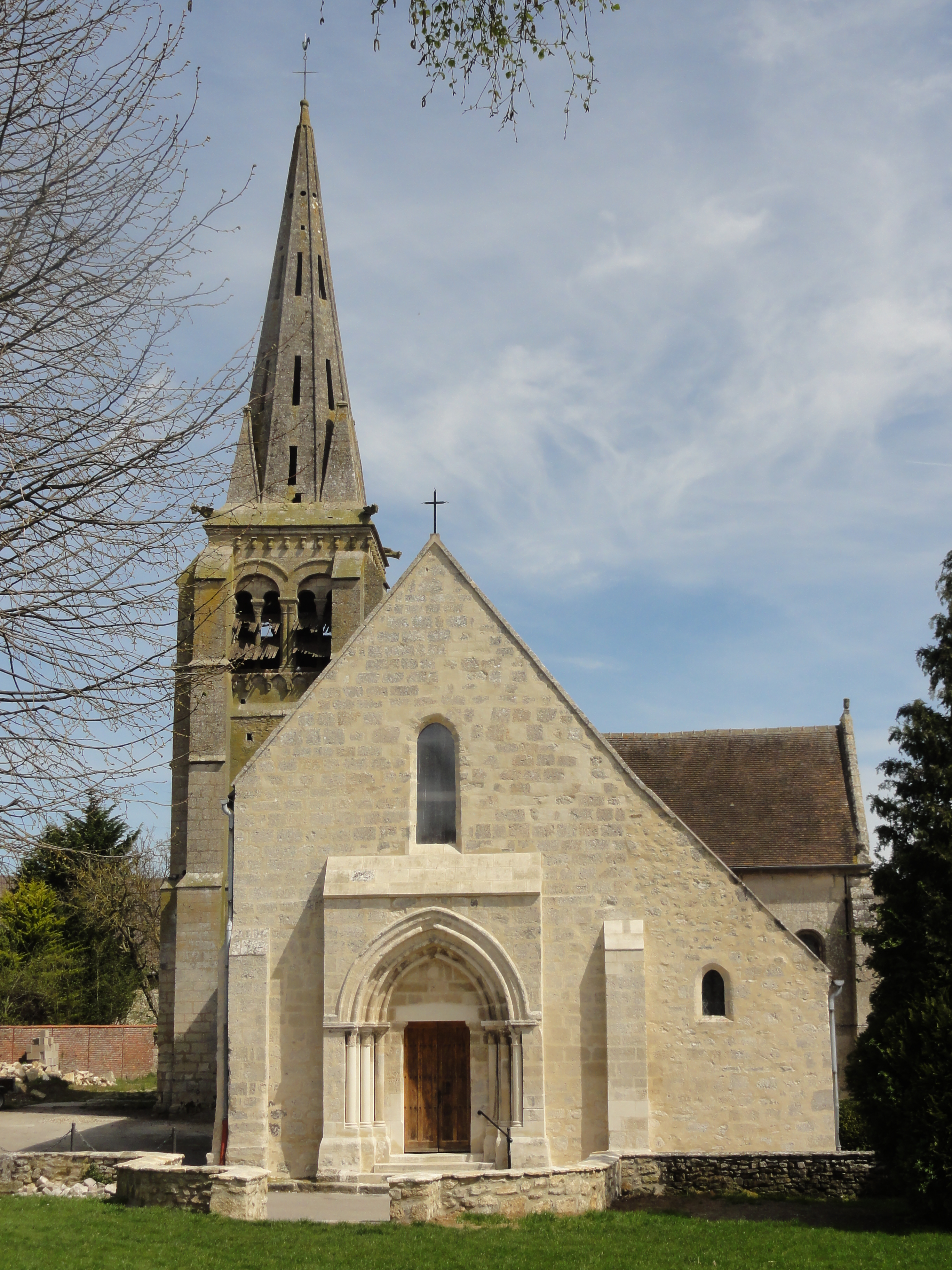 Église Saint-Caprais d'Auger-Saint-Vincent (voir titre).